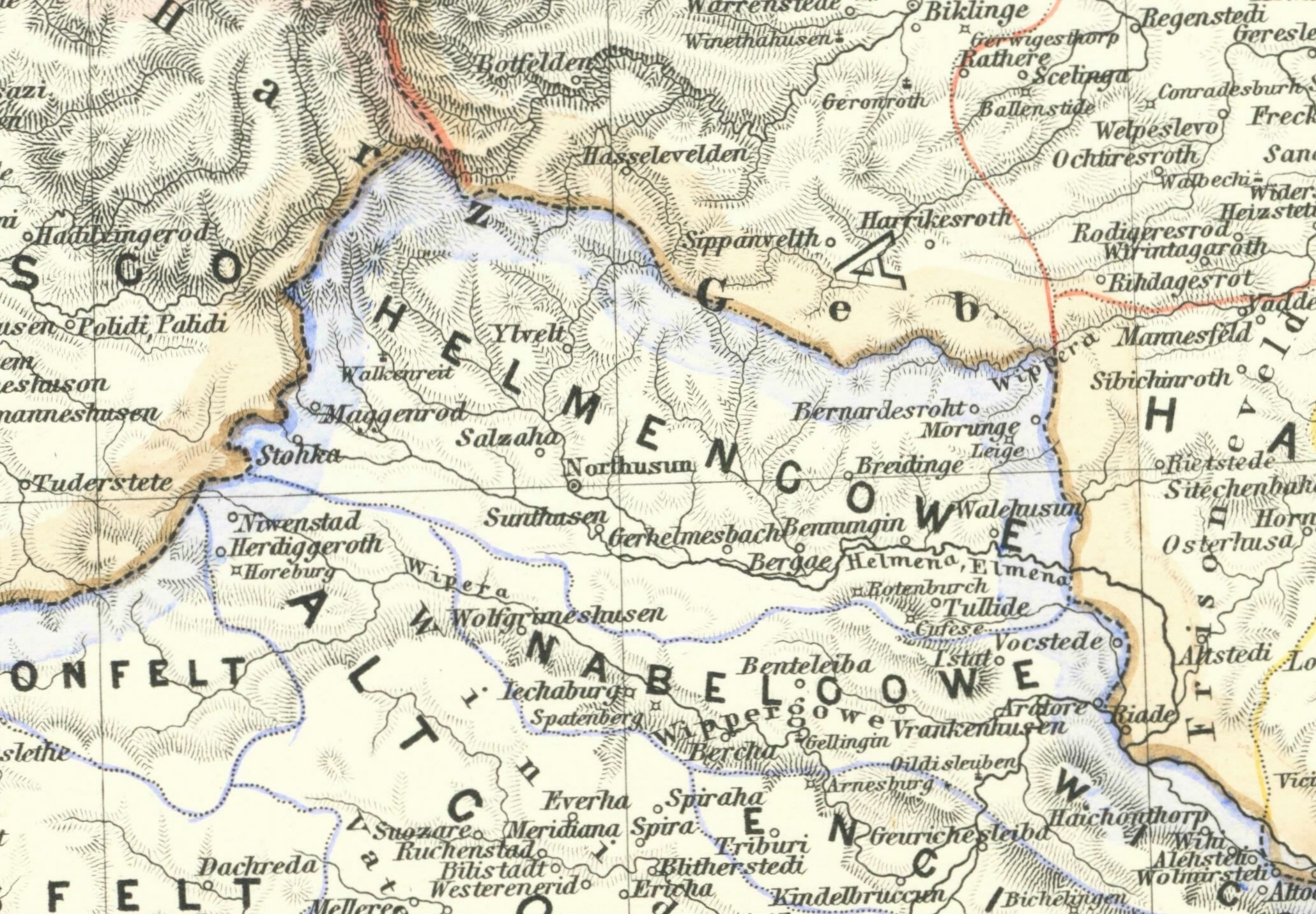 Deutschlands Gaue III: Sachsen, Nördliches Thüringen (Bildausschnitt nördliches Thüringen-Helmegau, Nabelgau)